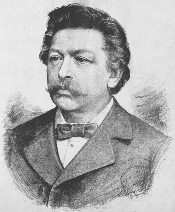 František Zdeněk Skuherský (1830 - 1892). Portréty osobností od Jana Vilímka